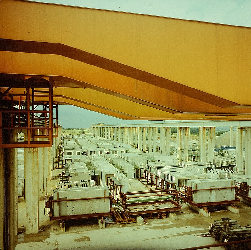 Original image description from the Deutsche Fotothek Betonwerker